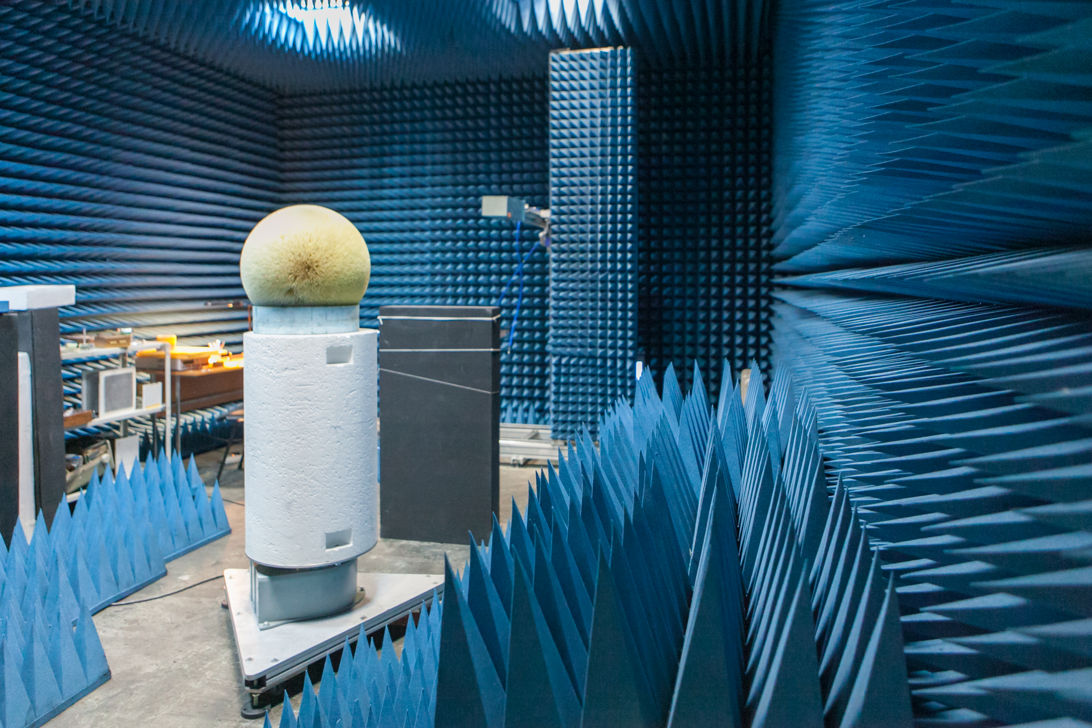 Безэховая камера лаборатории «Метаматериалы» Университета ИТМО